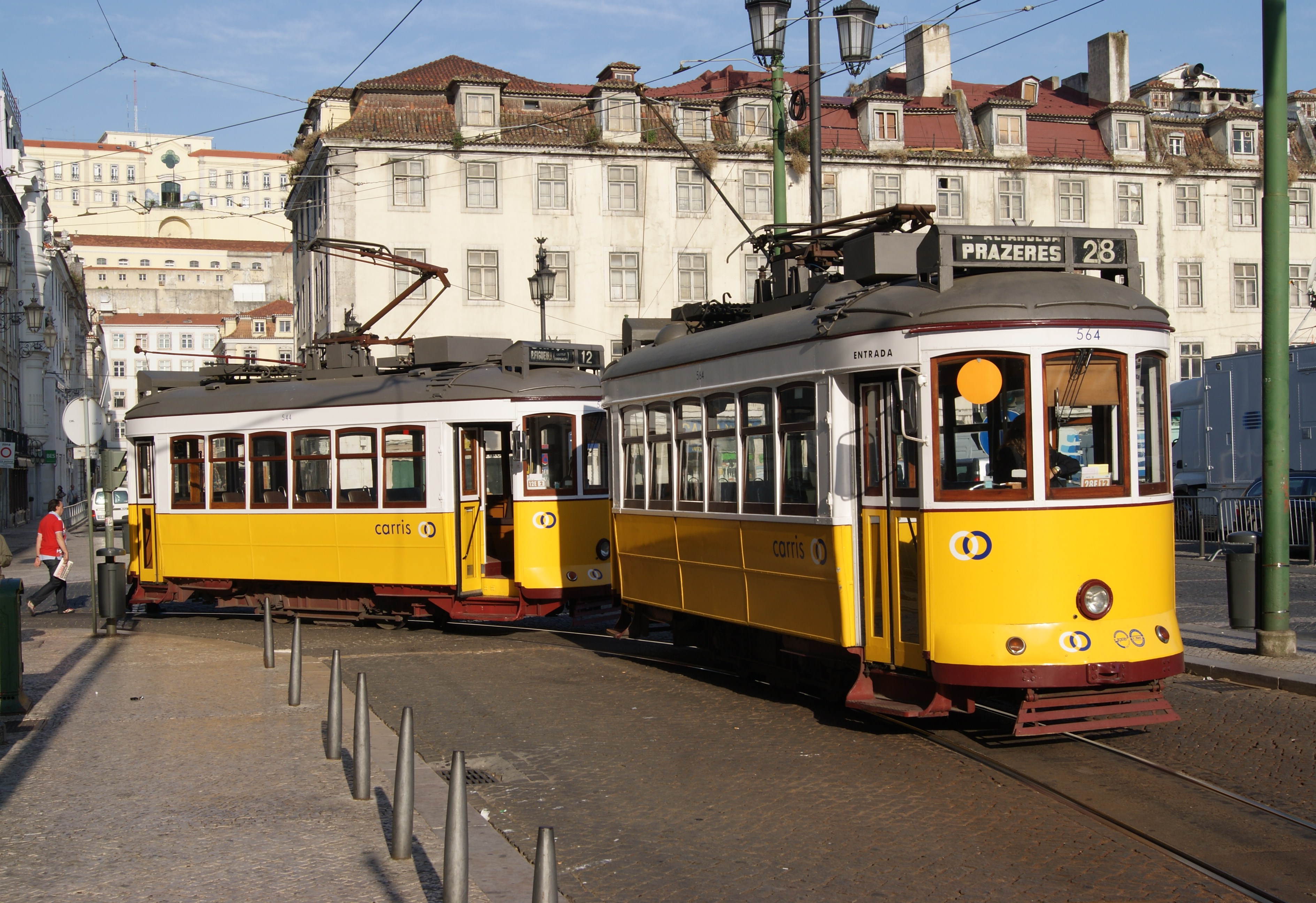 Photo: Trams aux Fils. Ligne 28, direction PRAZERES Tram 564 ancien tram 266 de la série 203-282